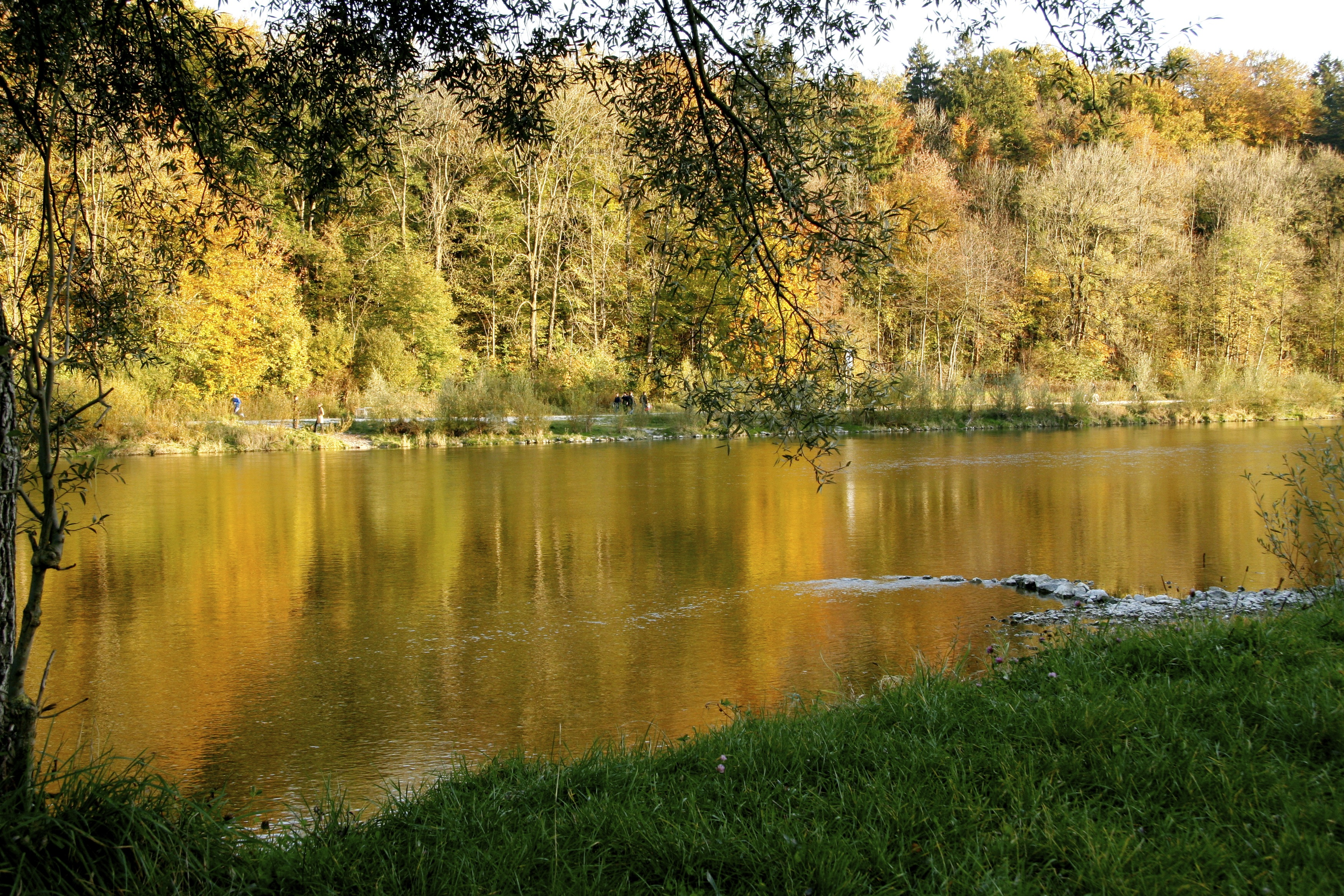 Die Isar im Münchner Stadtteil Thalkirchen im Herbst